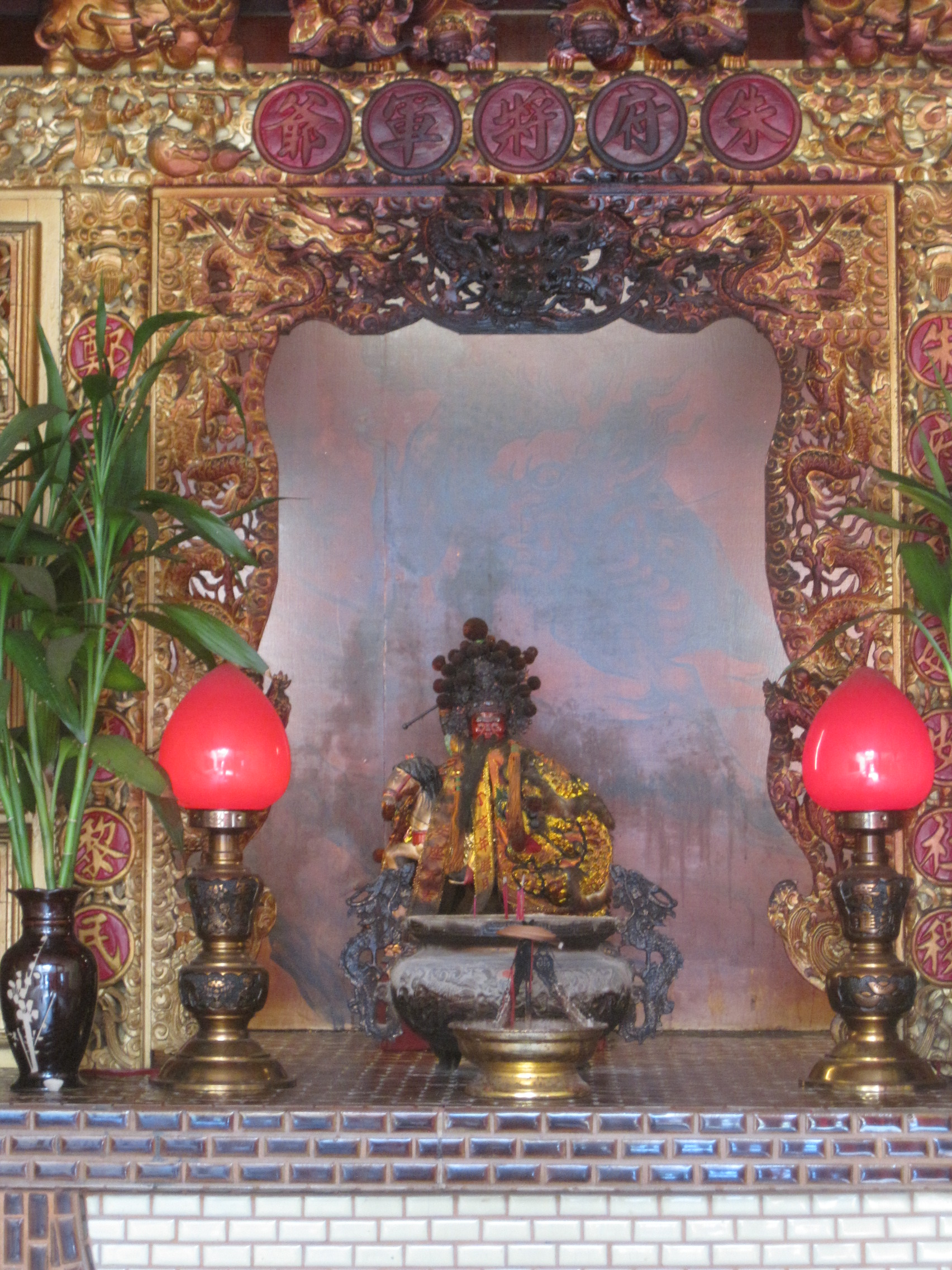 八份姑媽宮朱府將軍爺